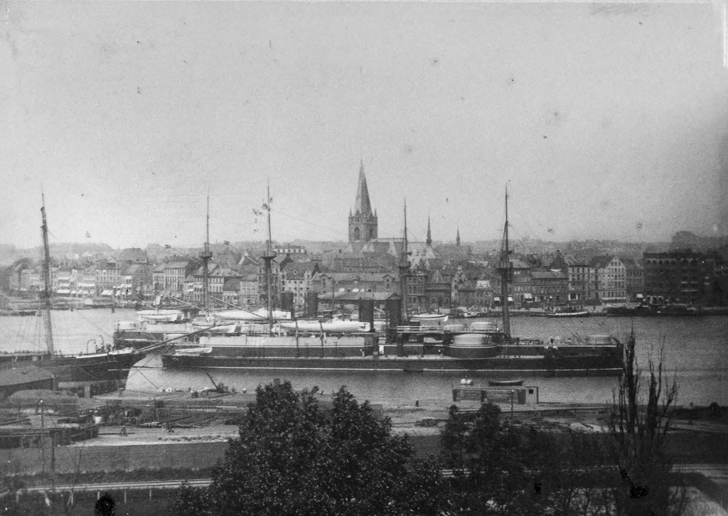 im Hafen. Blick von Gaarden zur Altstadt mit dem Wall. Im Hintergrund die Nikolaikirche.